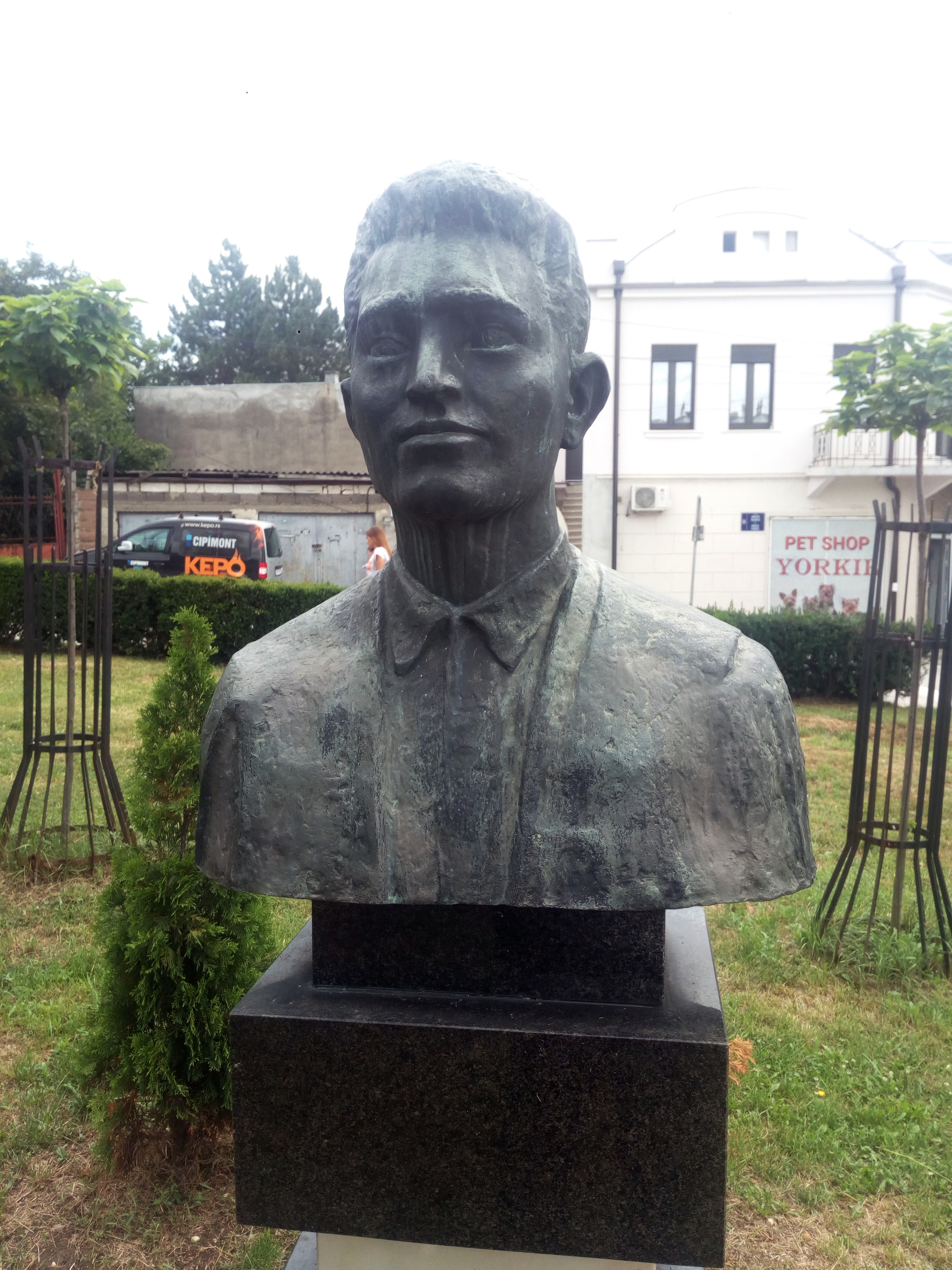 Спомен-биста Милосава Влајића у Младеновцу